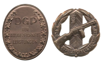 Leistungsabzeichen der Deutschen Grenztruppen der DDR, links die 1. Form und rechts die 2. Form